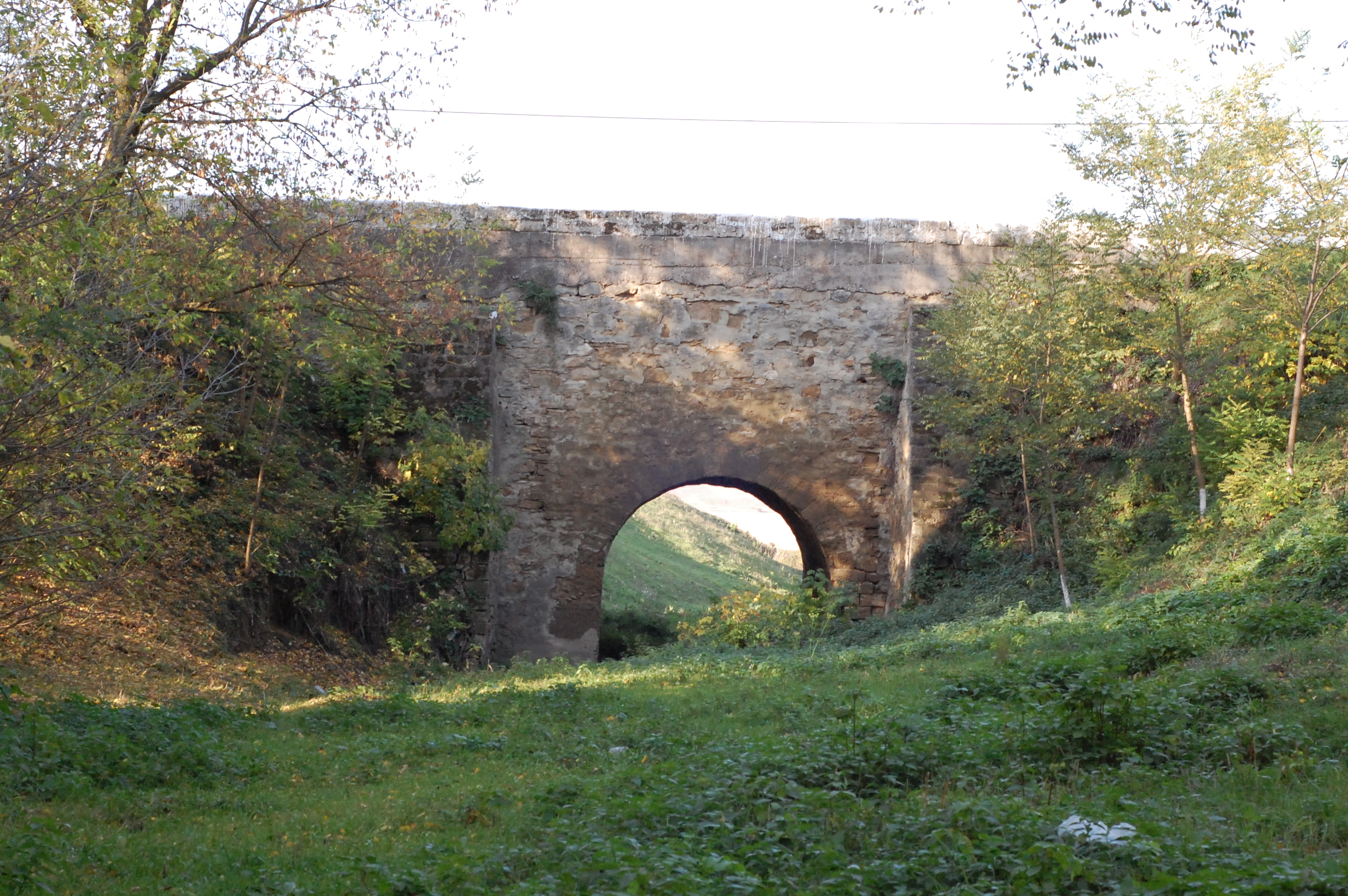 Podul de piatră din Cănţălăreşti, construit în 1626 de către hatmanul Gavril. 15 octombrie 2009